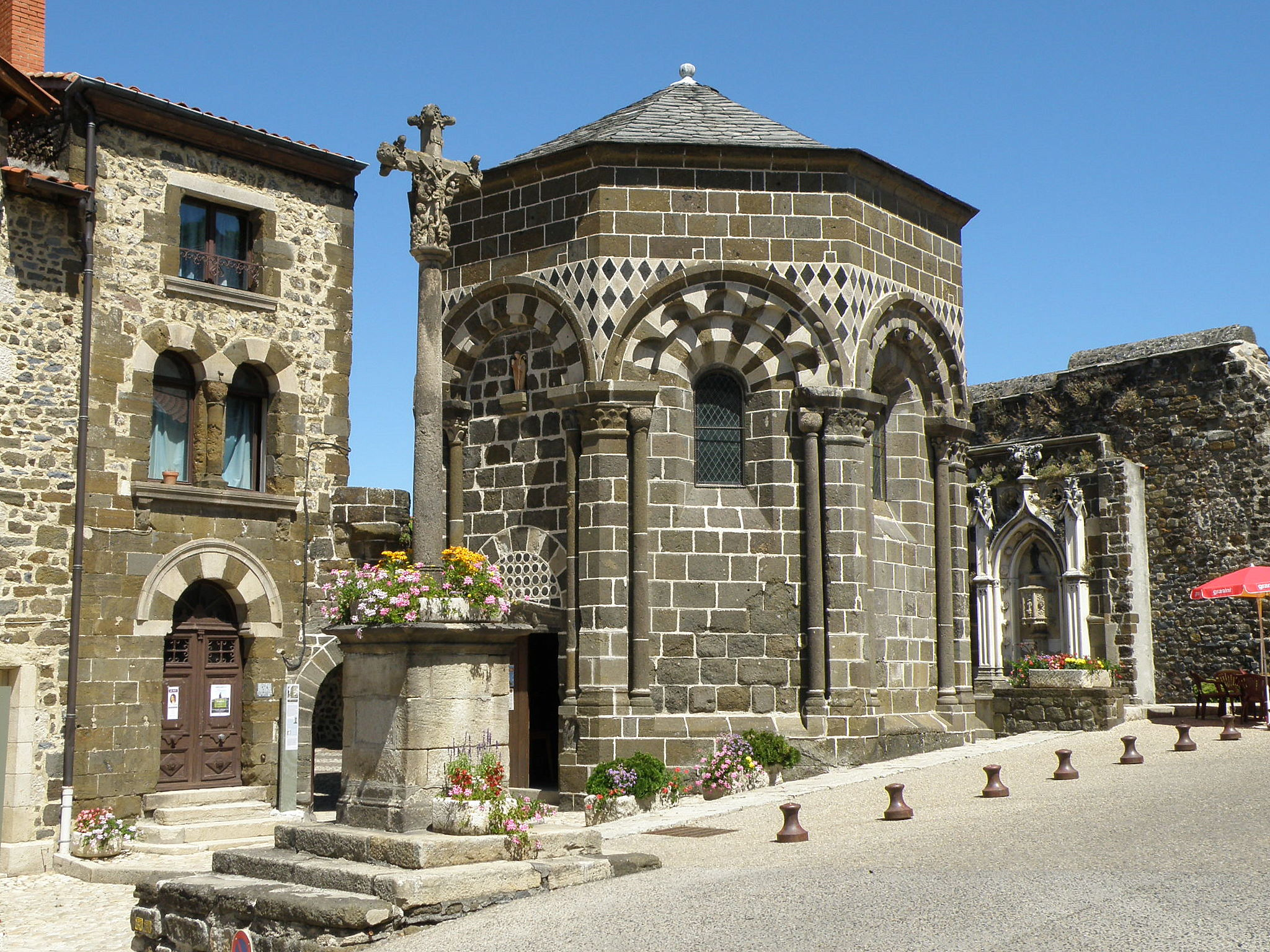 Commune d'Aiguilhe, près du Puy-en-Velay (préf. de la Haute-Loire, France). Sur cette placette à l'entrée du bourg, on reconnaît, de gauche à droite : l'ancienne mairie, la croix monumentale en pierre du XVe siècle, la Chapelle Saint-Clair (XIIe siècle, octogonale), et une fontaine pseudo-gothique du XIXe siècle.